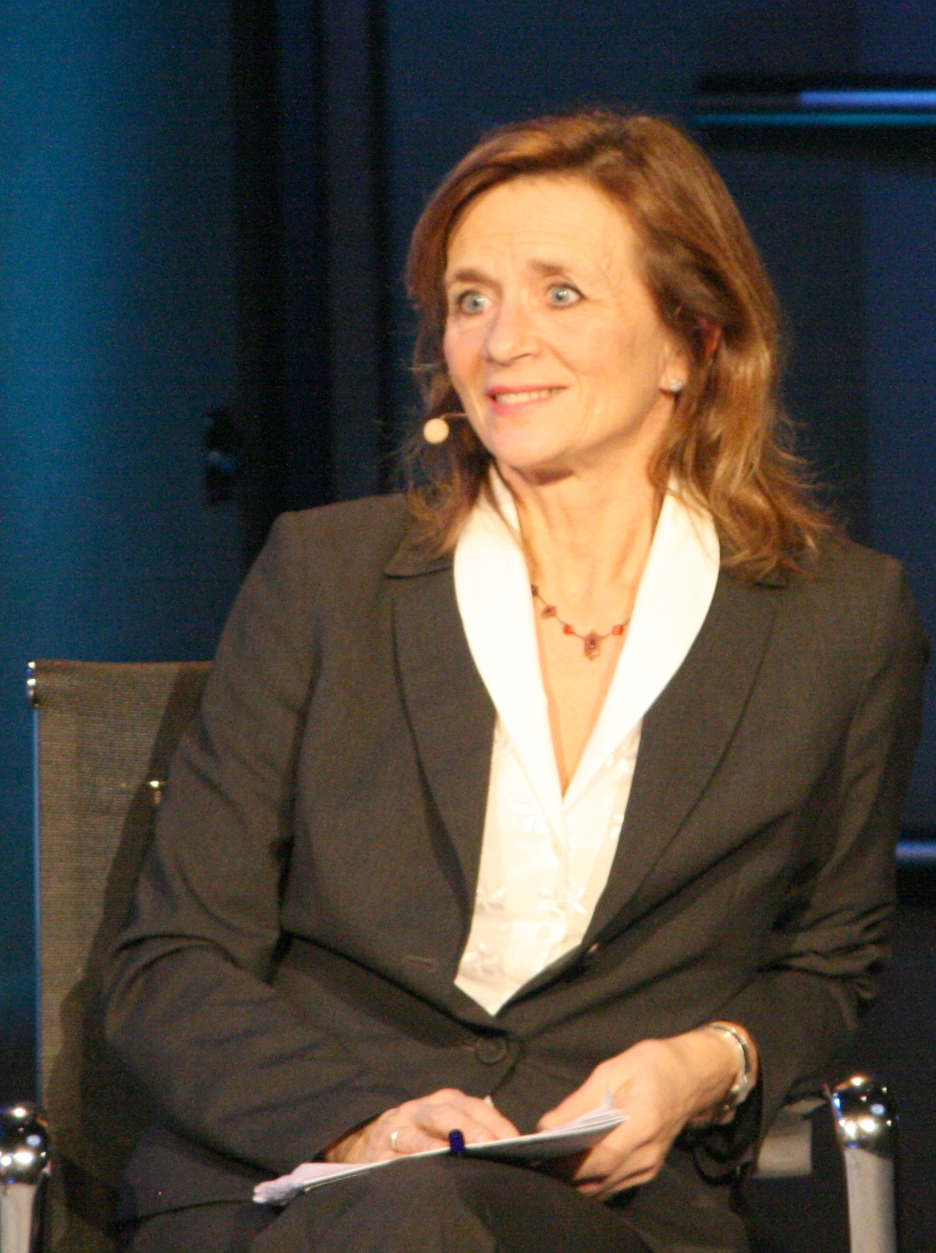 Torunn Janbu, lege og president i Den norske lægeforening. Fra NHOs Årskonferanse 2009.